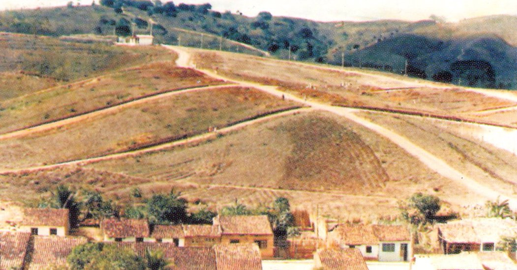 mutirão cidade de deus em viçosa alagoas